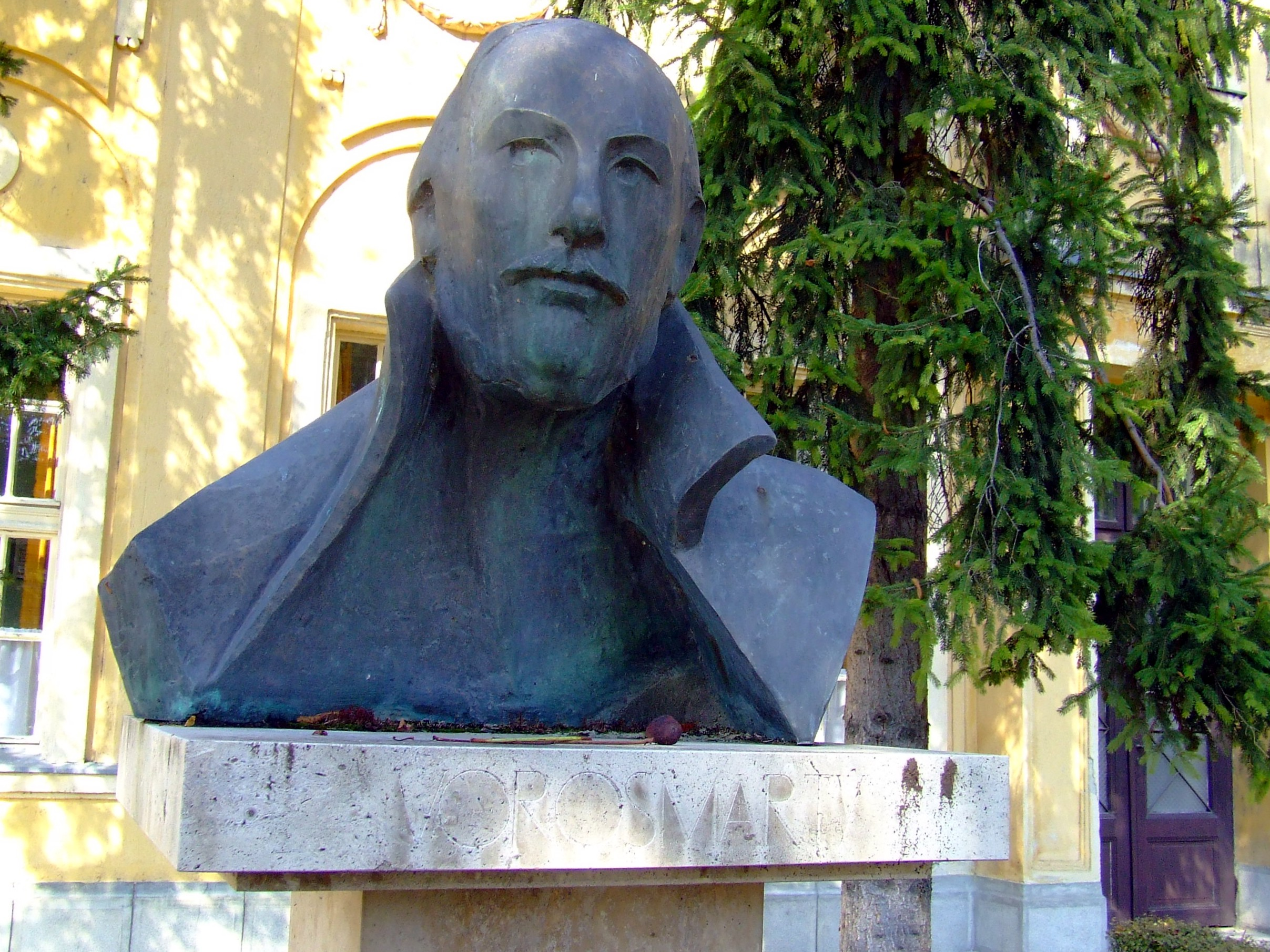 Vörösmarty Mihály szobra Bácsalmáson. Kalmár János (*1952) szobrászművész alkotása (1983)